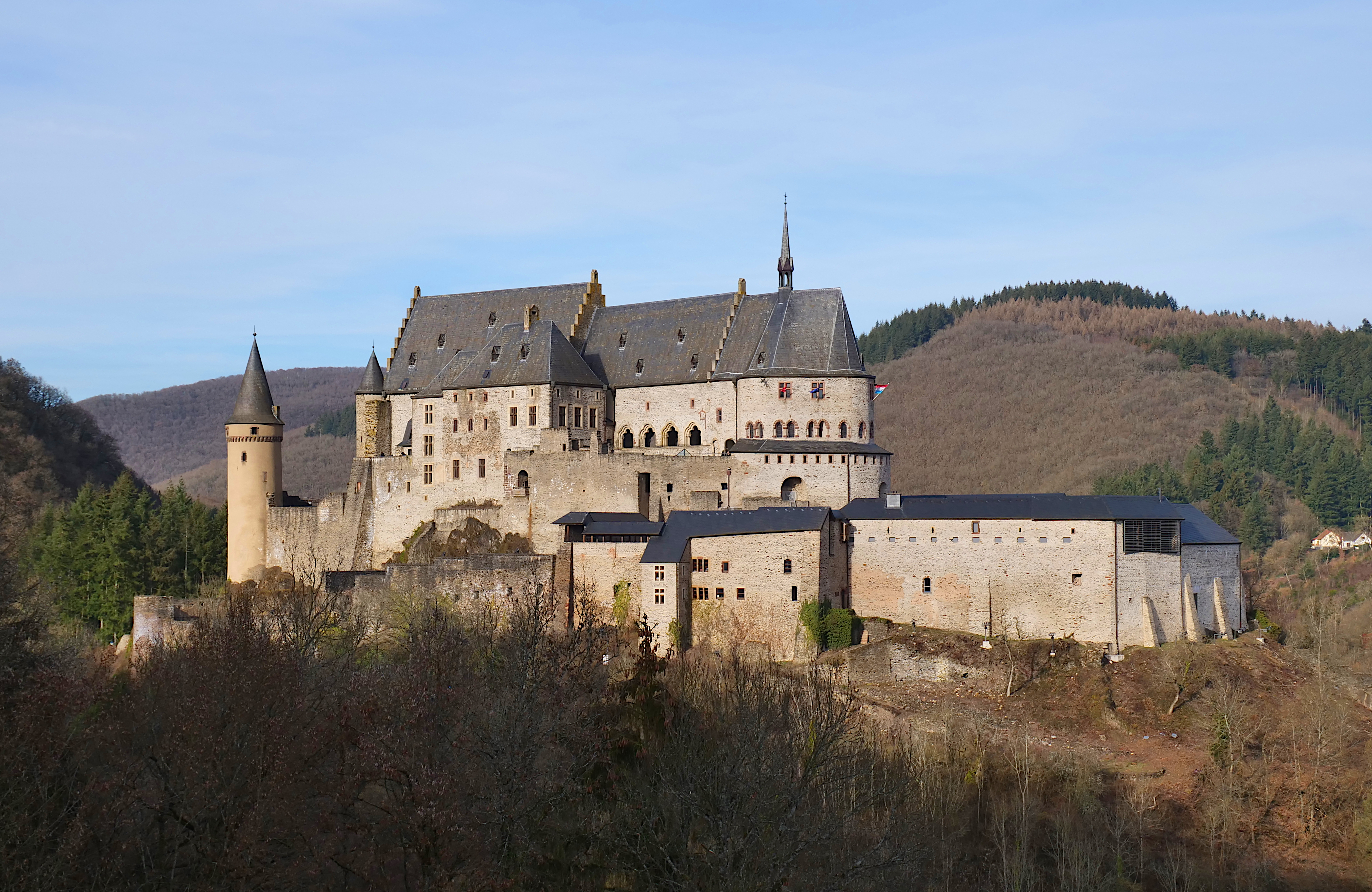 Vianden Castle, Burg Vianden, Schlass Veianen Luxembourg, Luxemburg, Lëtzebuerg